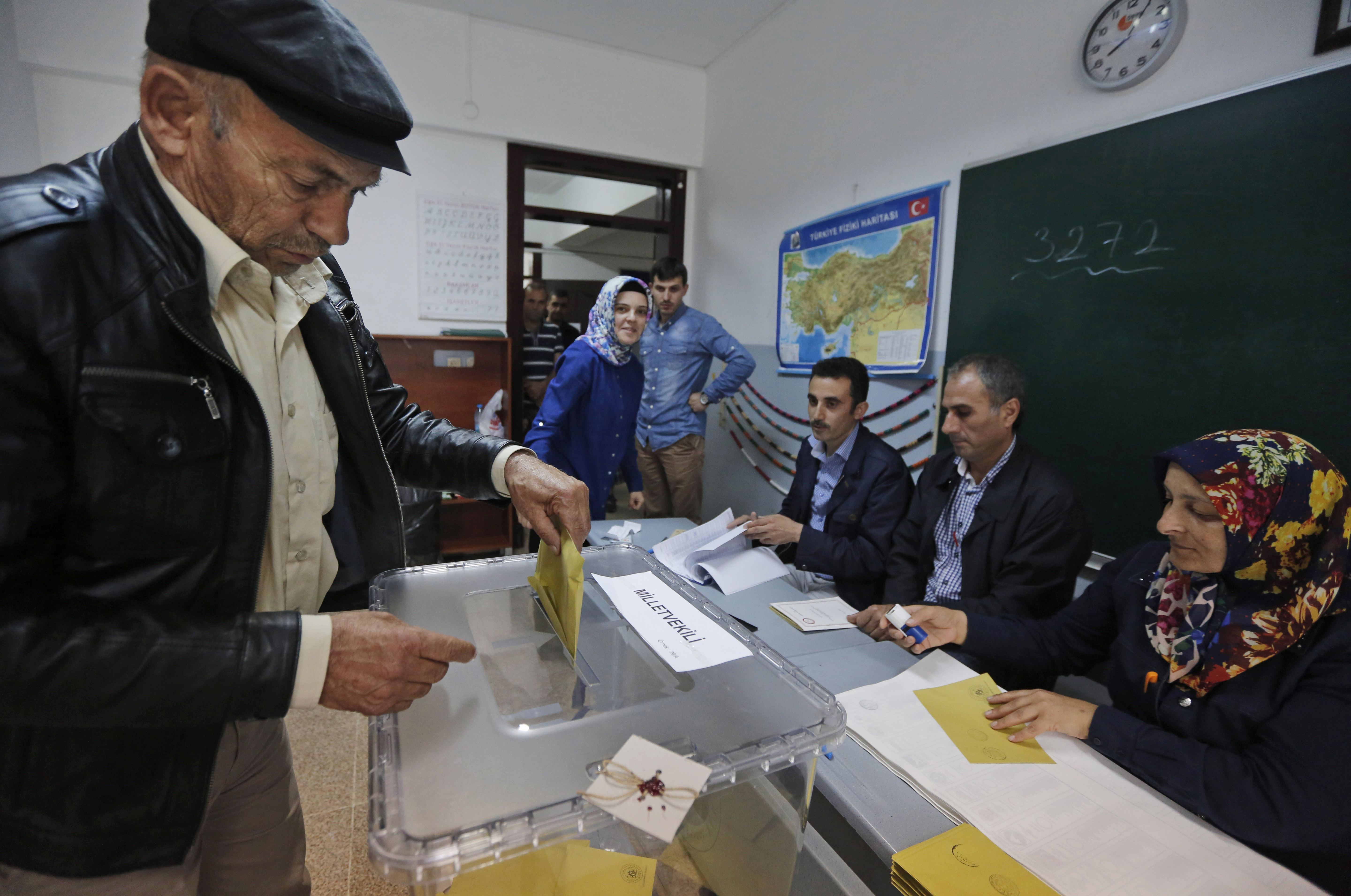 Ankara'daki 3272 numaralı sandıkta oyunu kullanan bir vatandaş.